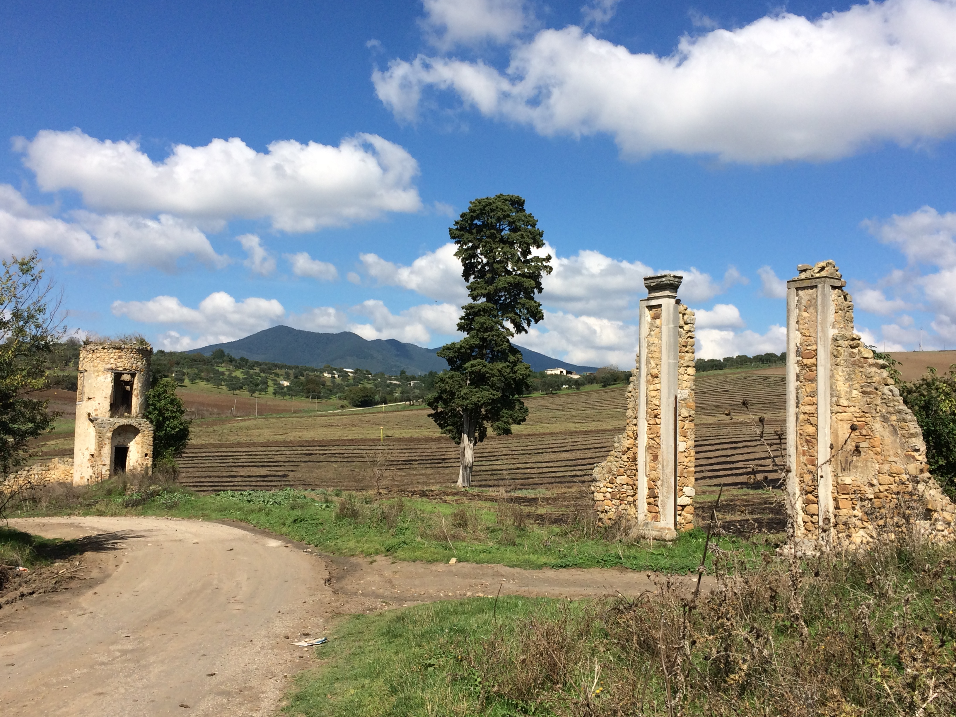 Torre degli Embrici This is a photo of a monument which is part of cultural heritage of Italy.